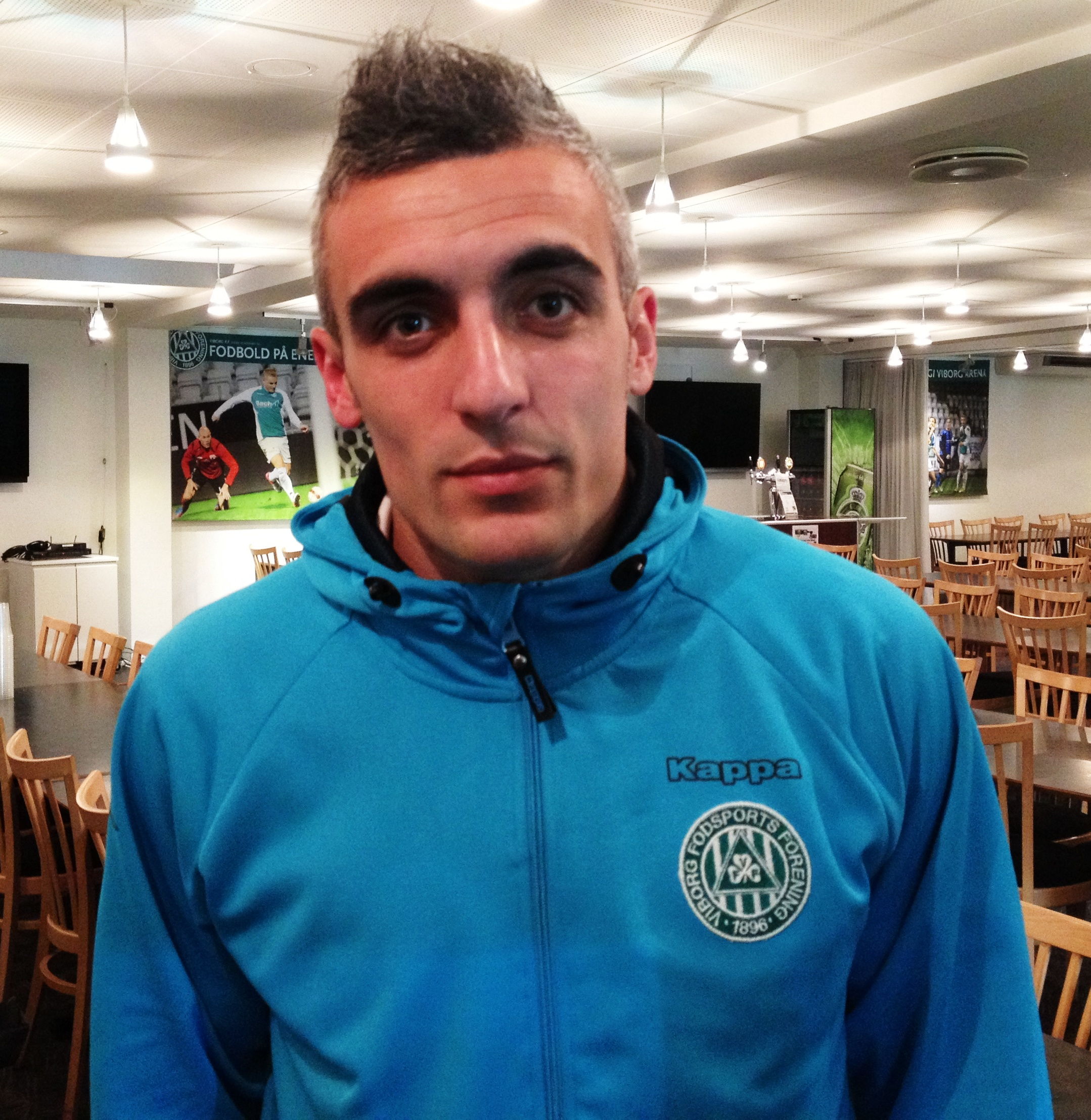 Fodboldspiller Aleksandar Stankov fra Viborg FF.